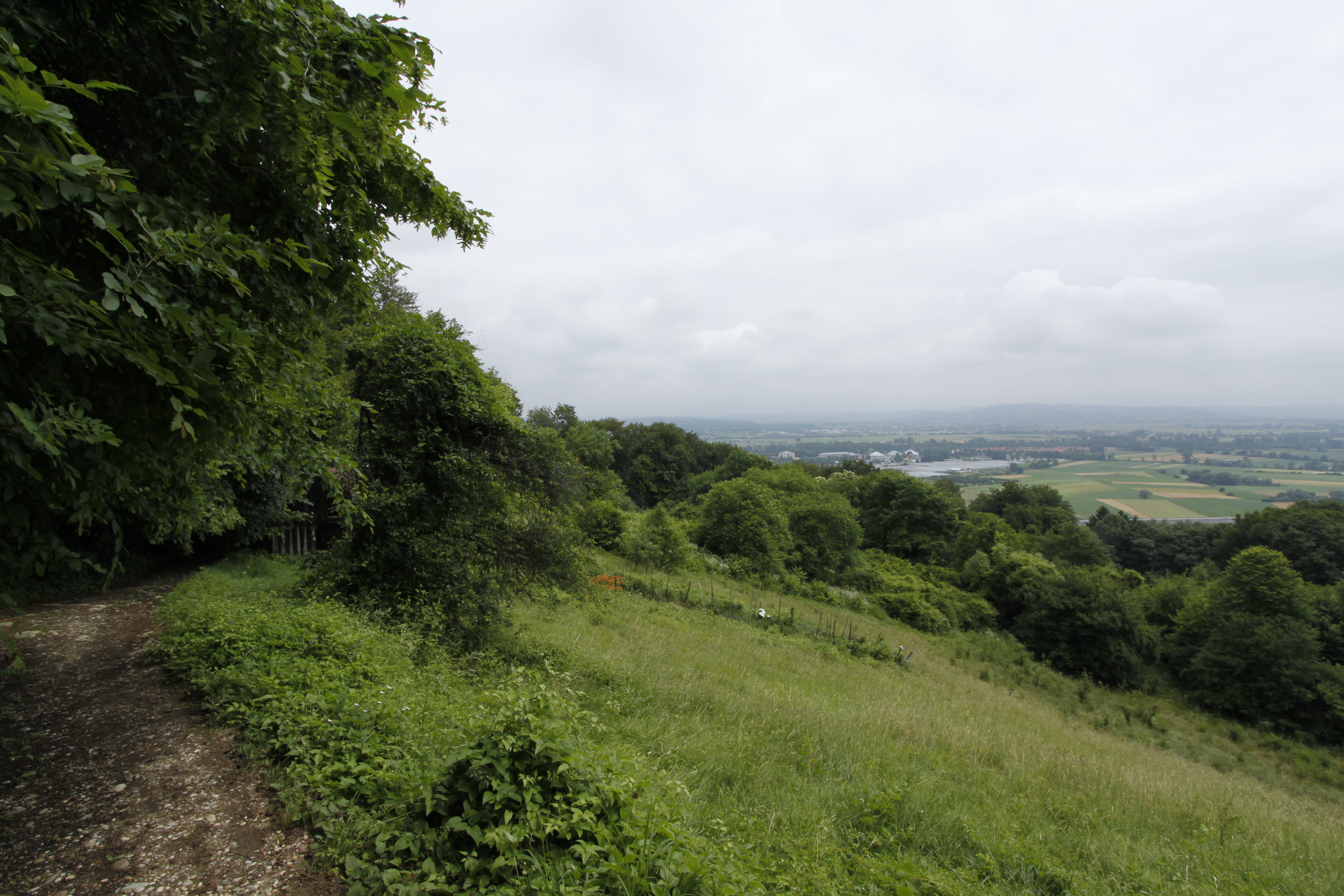 _MG_2748